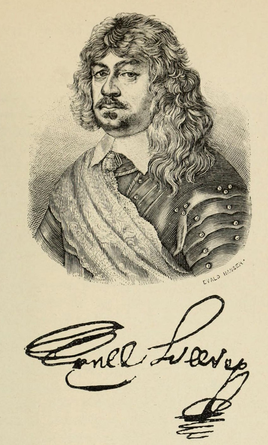 Axel Lillie, xylography